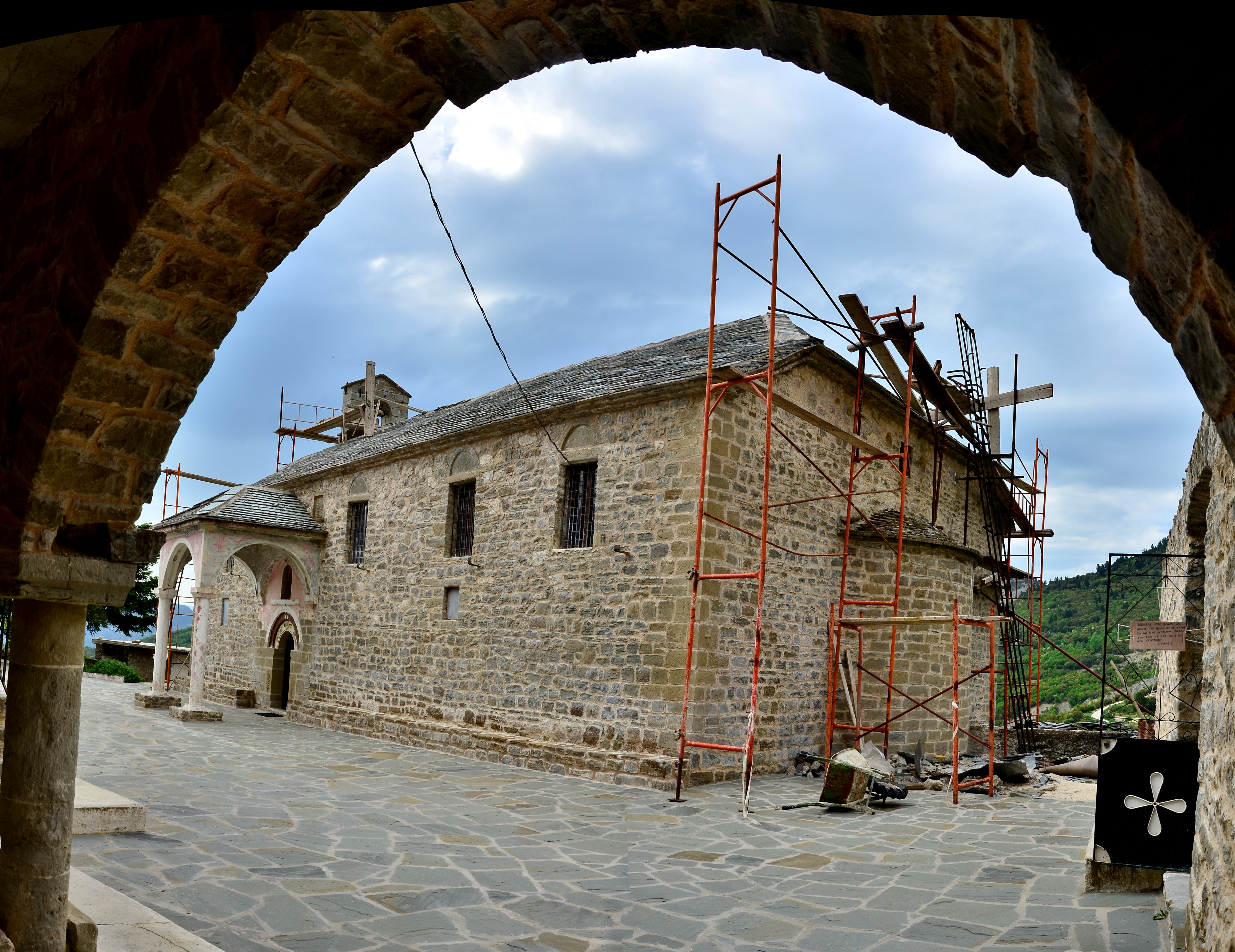 Μονή Αγίας Αικατερίνης στο χωριό Καταρράκτης Αρτας.